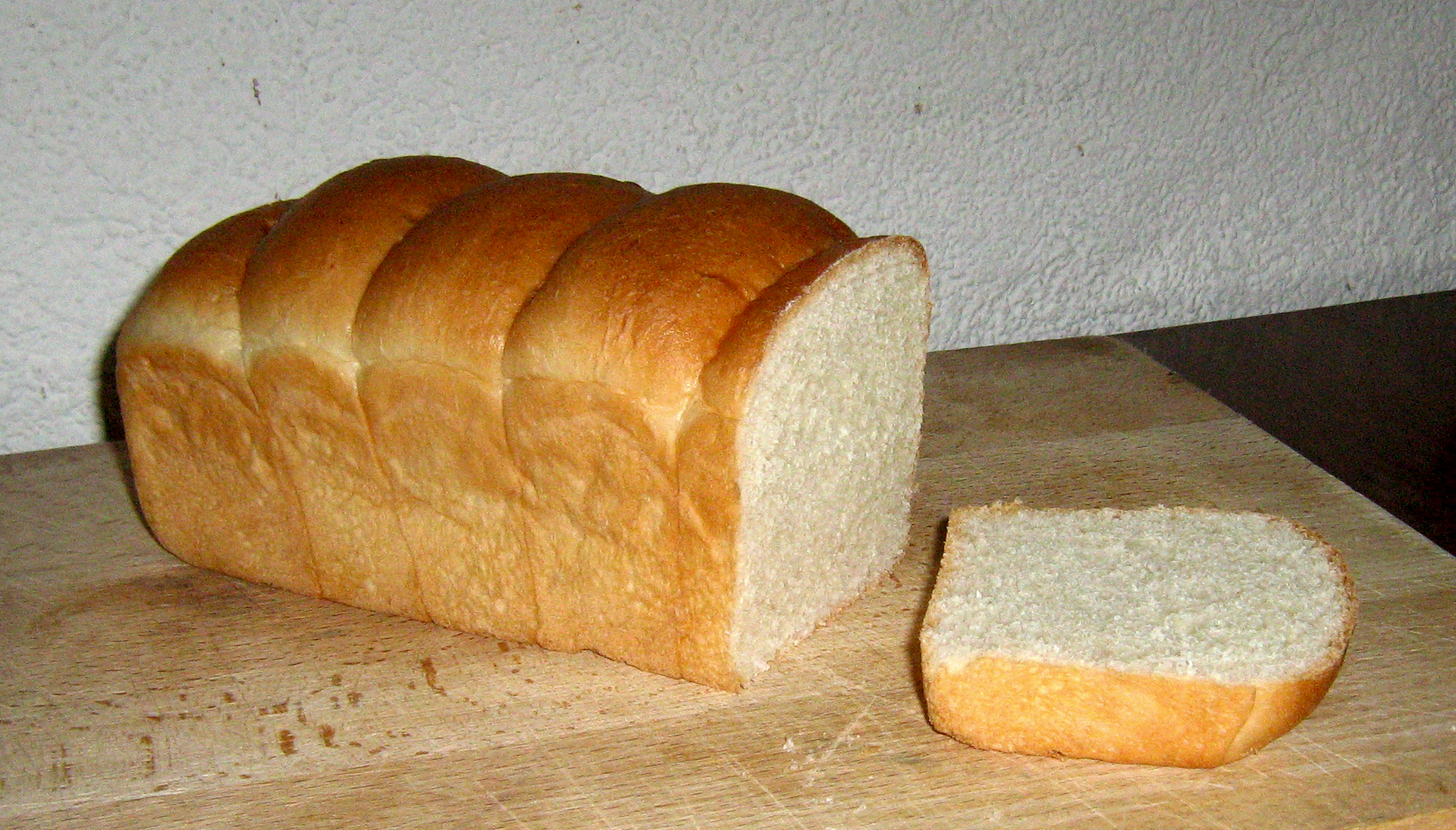 was man sich in der Schweiz unter einem Einback vorstellt